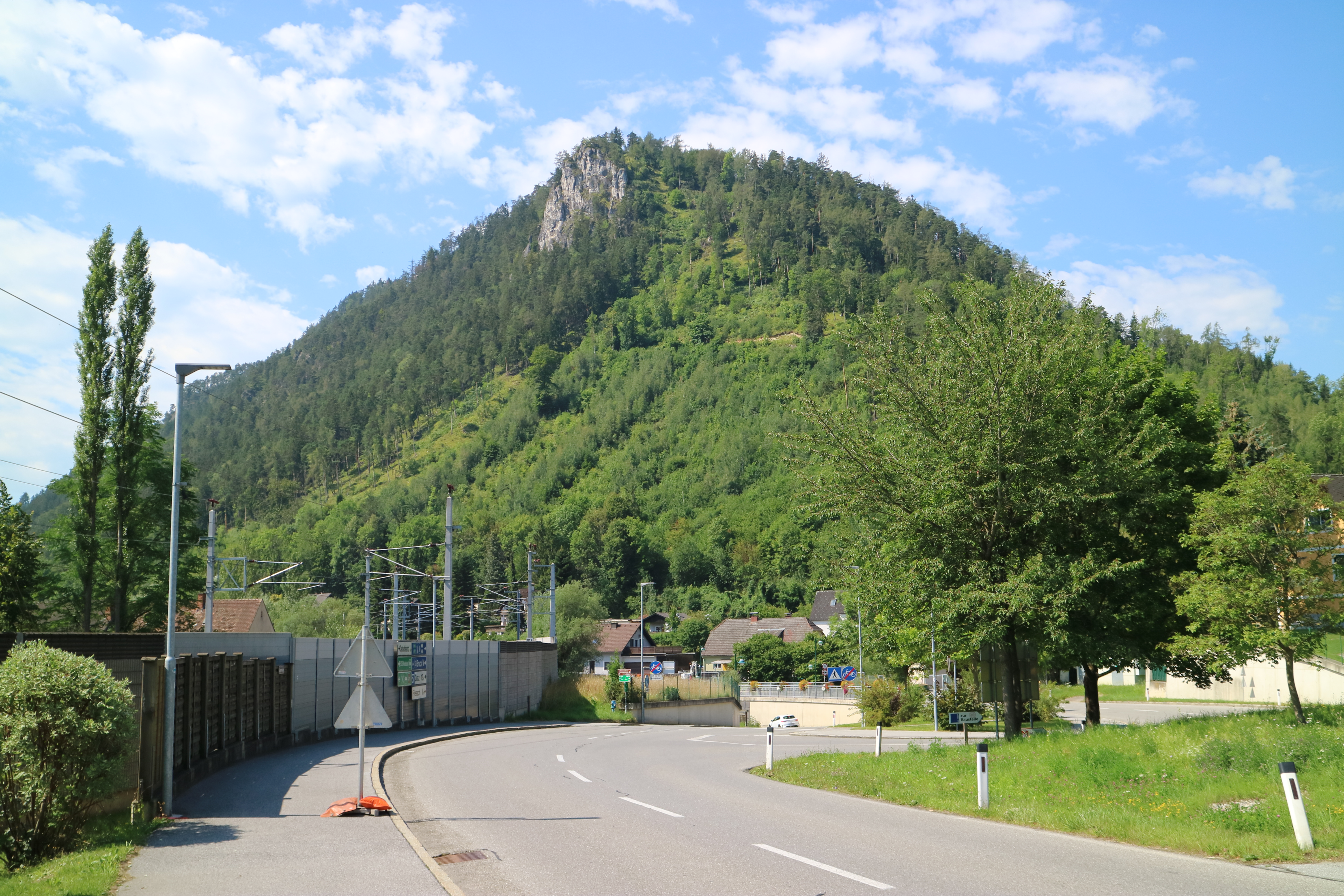 Pfaffenkogel von Nordosten (Kleinstübing), Gemeinde Deutschfeistritz, Steiermark